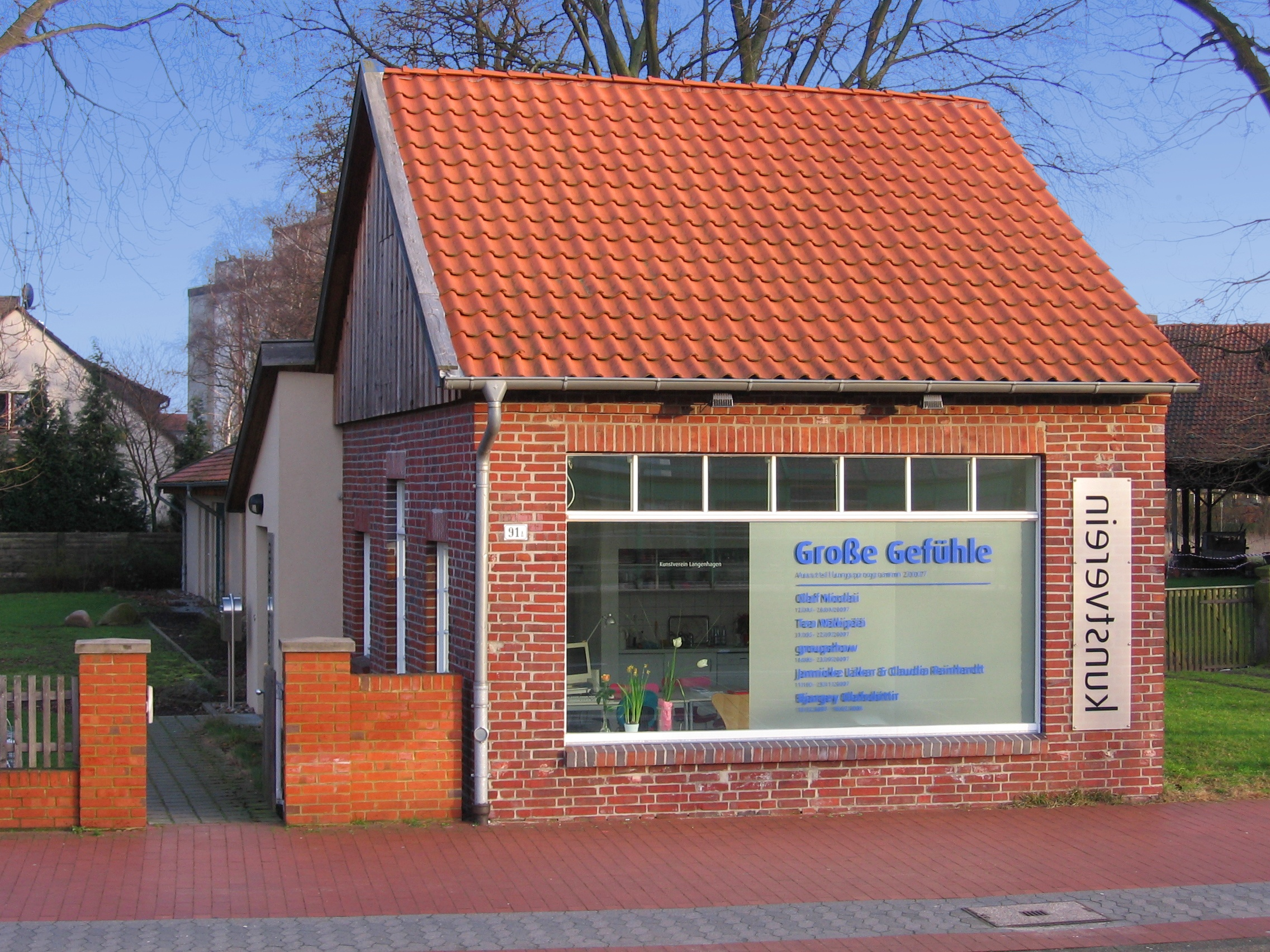 Kunstverein Langenhagen